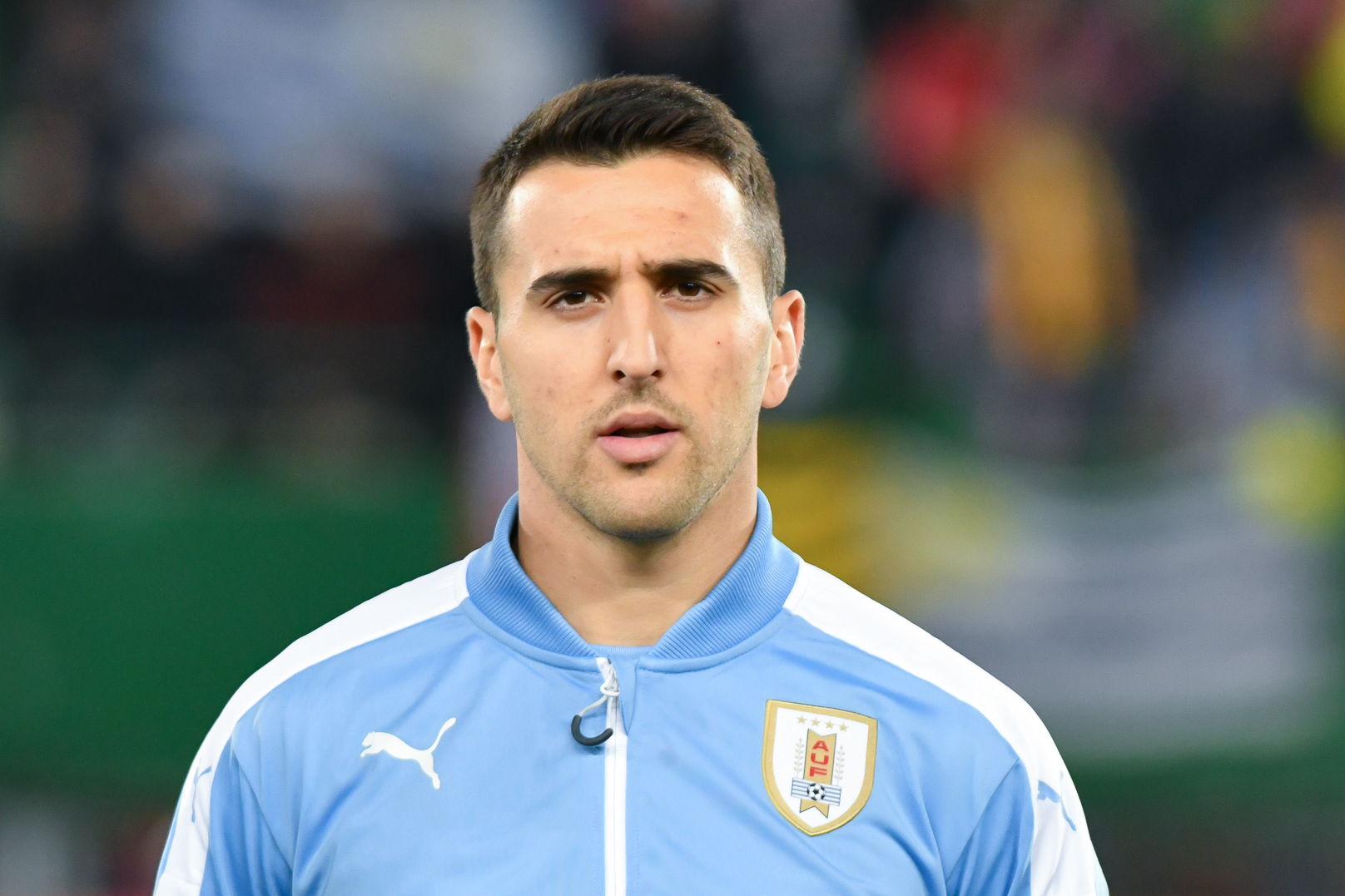 Wien, Österreich, 14.11.2017, Sport, Fussball, OEFB Freundschaftliches Laenderspiel - Österreich vs Uruguay. Bild zeigt Matias Vecino (URU).